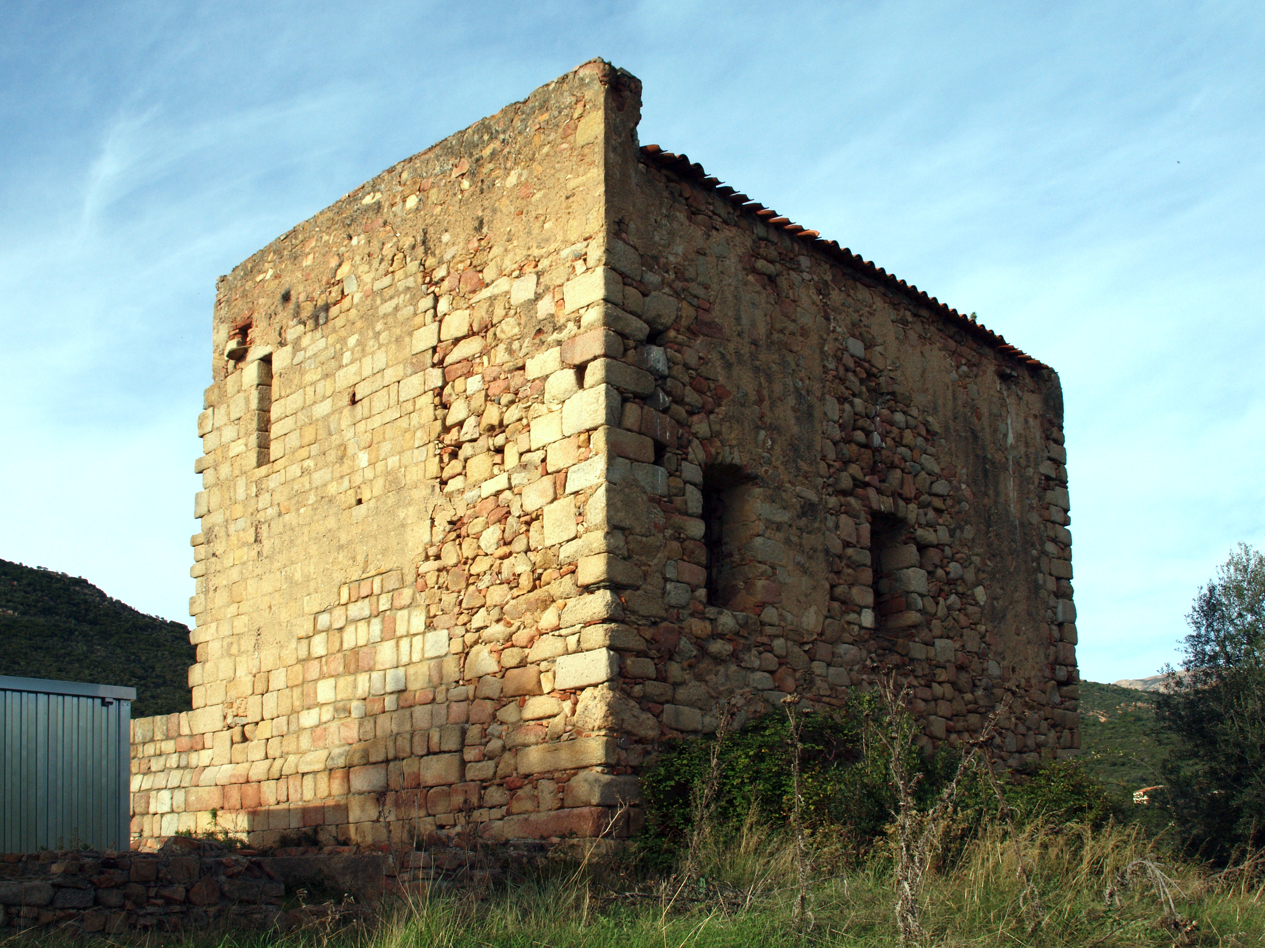 Vico, Ouest Corse (Corse) - Vue angle Sud-est de l'ancienne cathédrale Sant' Appiano à Sagone avec le menhir à la base